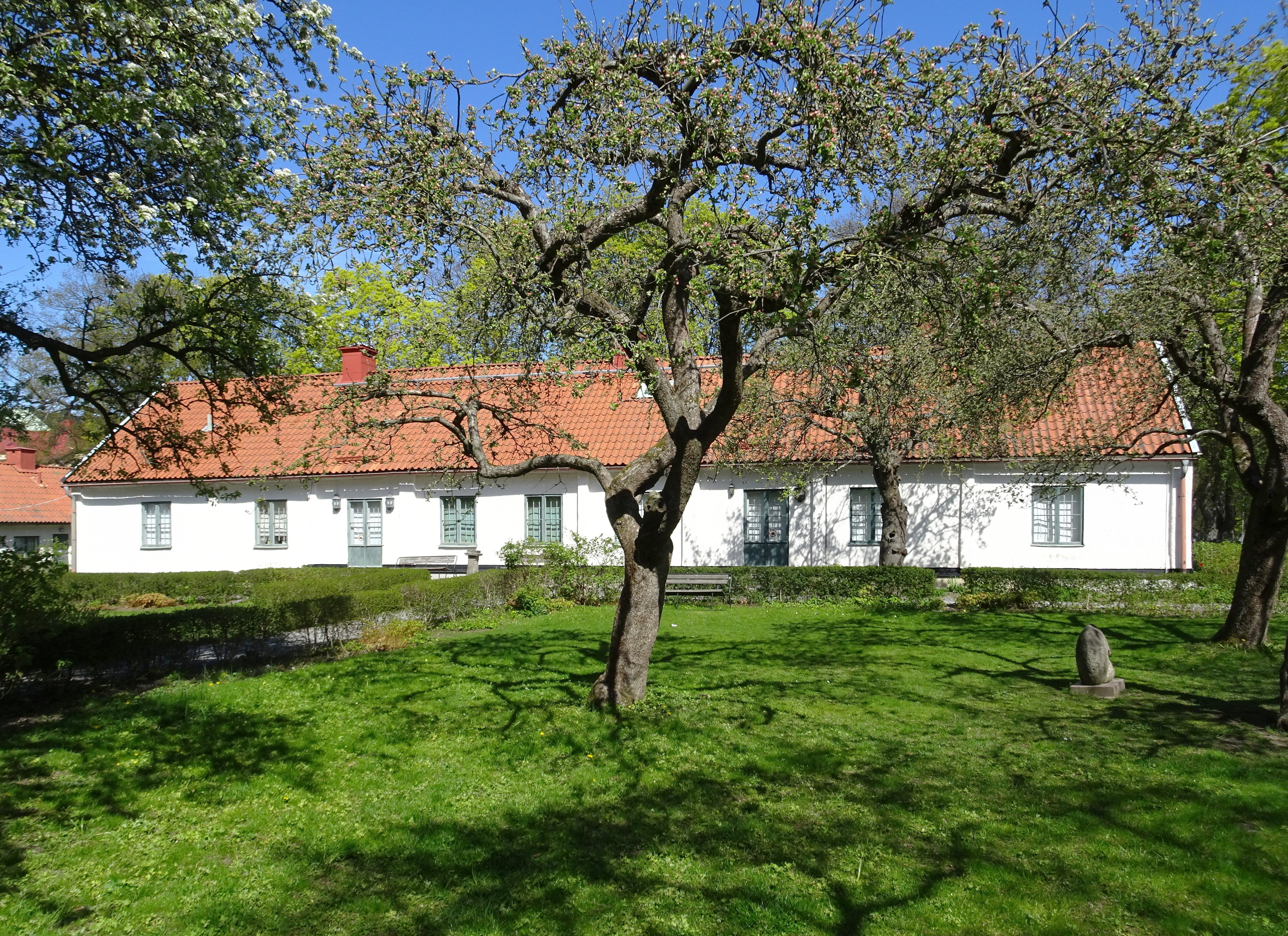 Charlottenburgs gård, huvudbyggnad